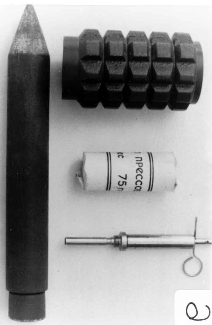 Sowiecka mina przeciwpiechotna POMZ-2